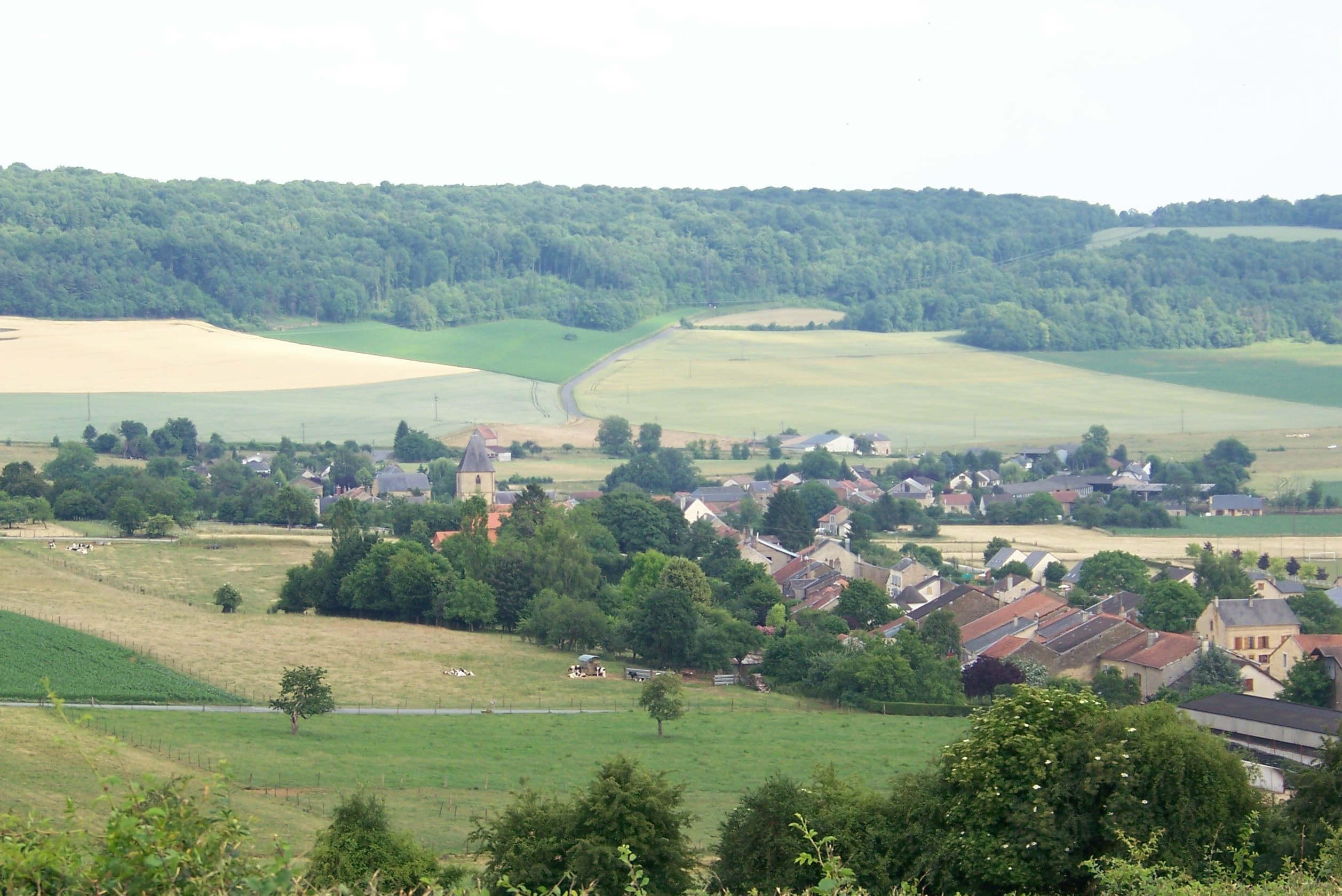 vue du village